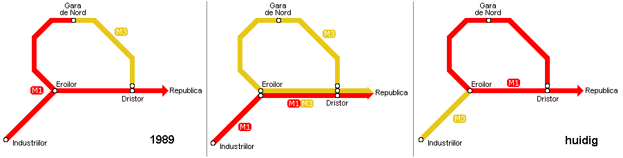 Kaart van de route van lijn M3 van de metro van Boekarest door de jaren heen